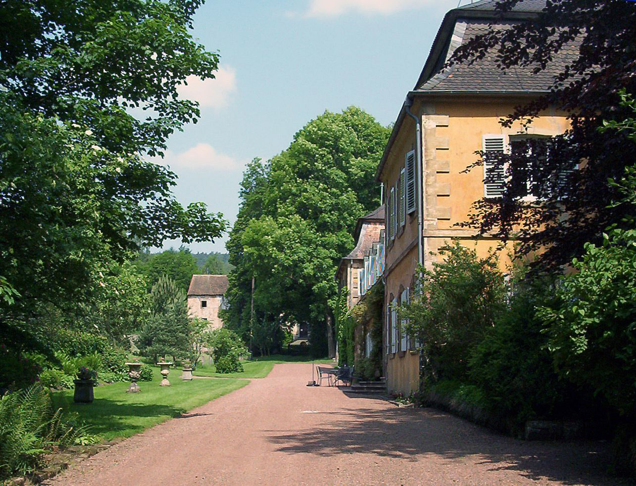 Blick auf den südlichen Seitenflügel von Schloss Gutenbrunn